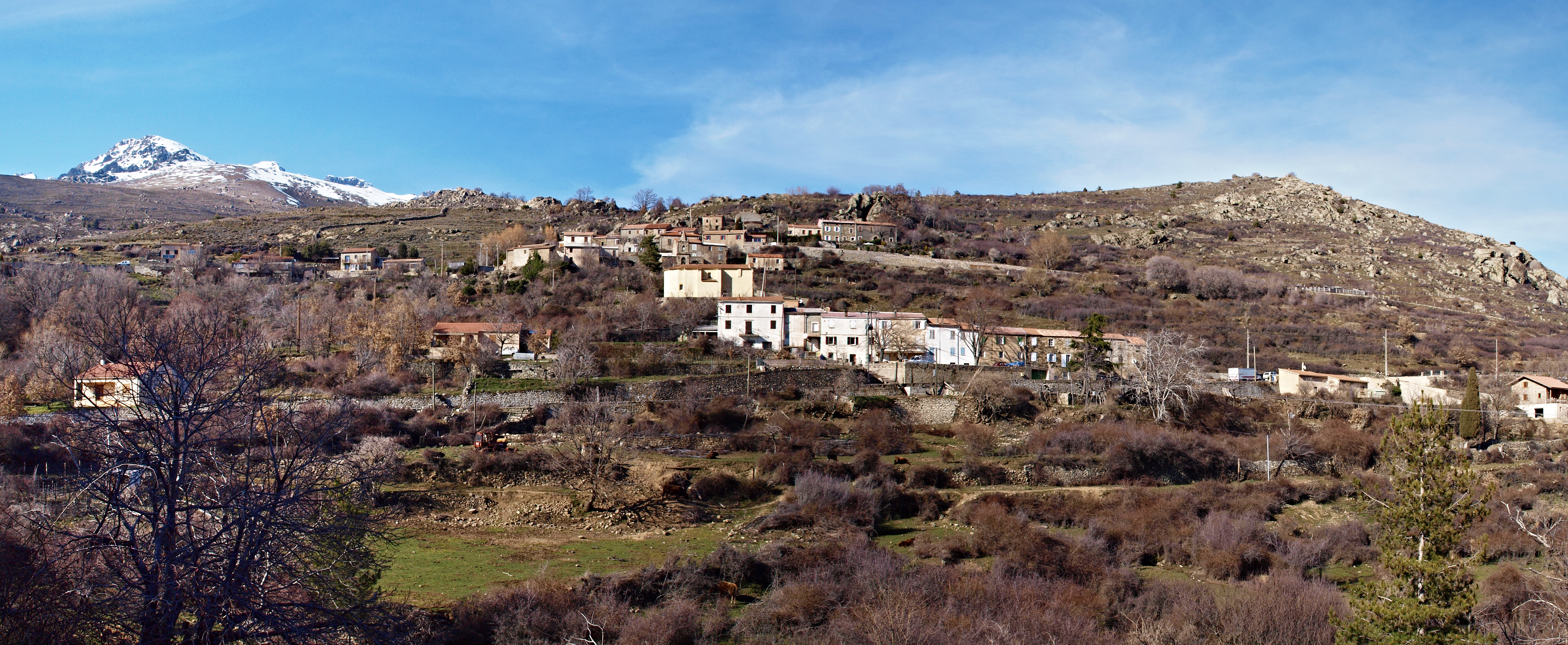 Albertacce (Corsica) - Hameau de Pietra-Zitamboli